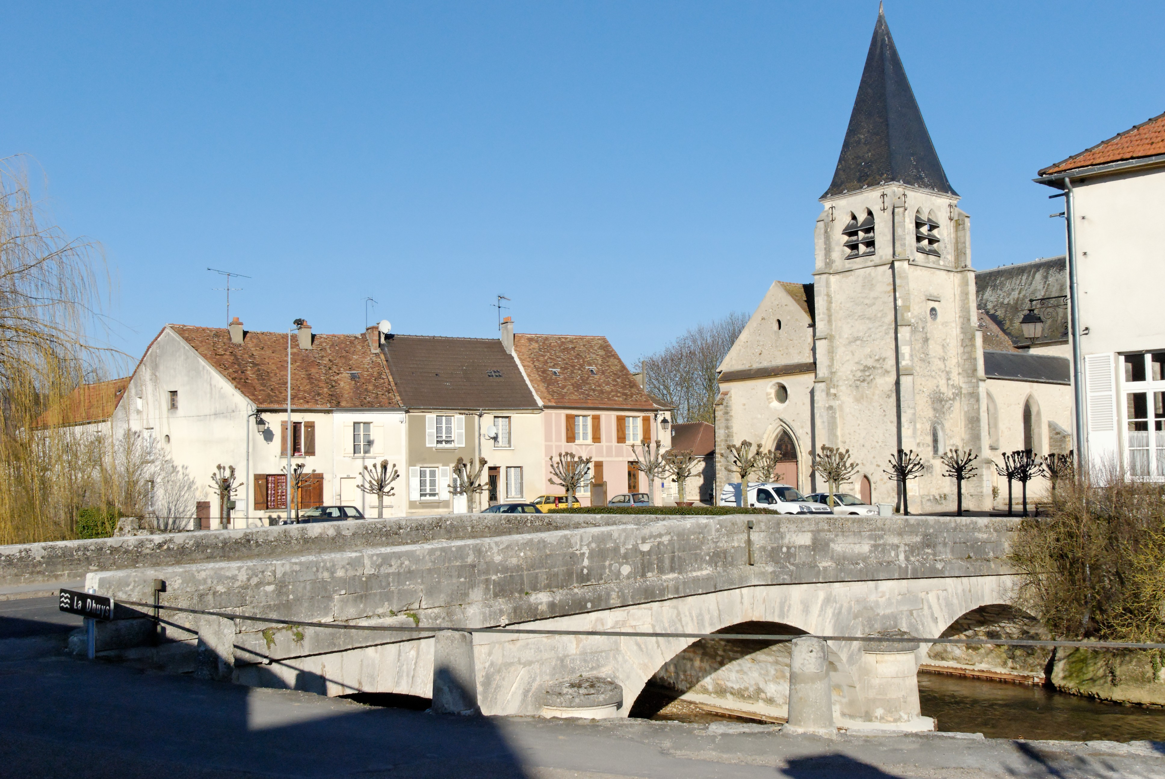 Centre-ville de Conde-en-Brie.